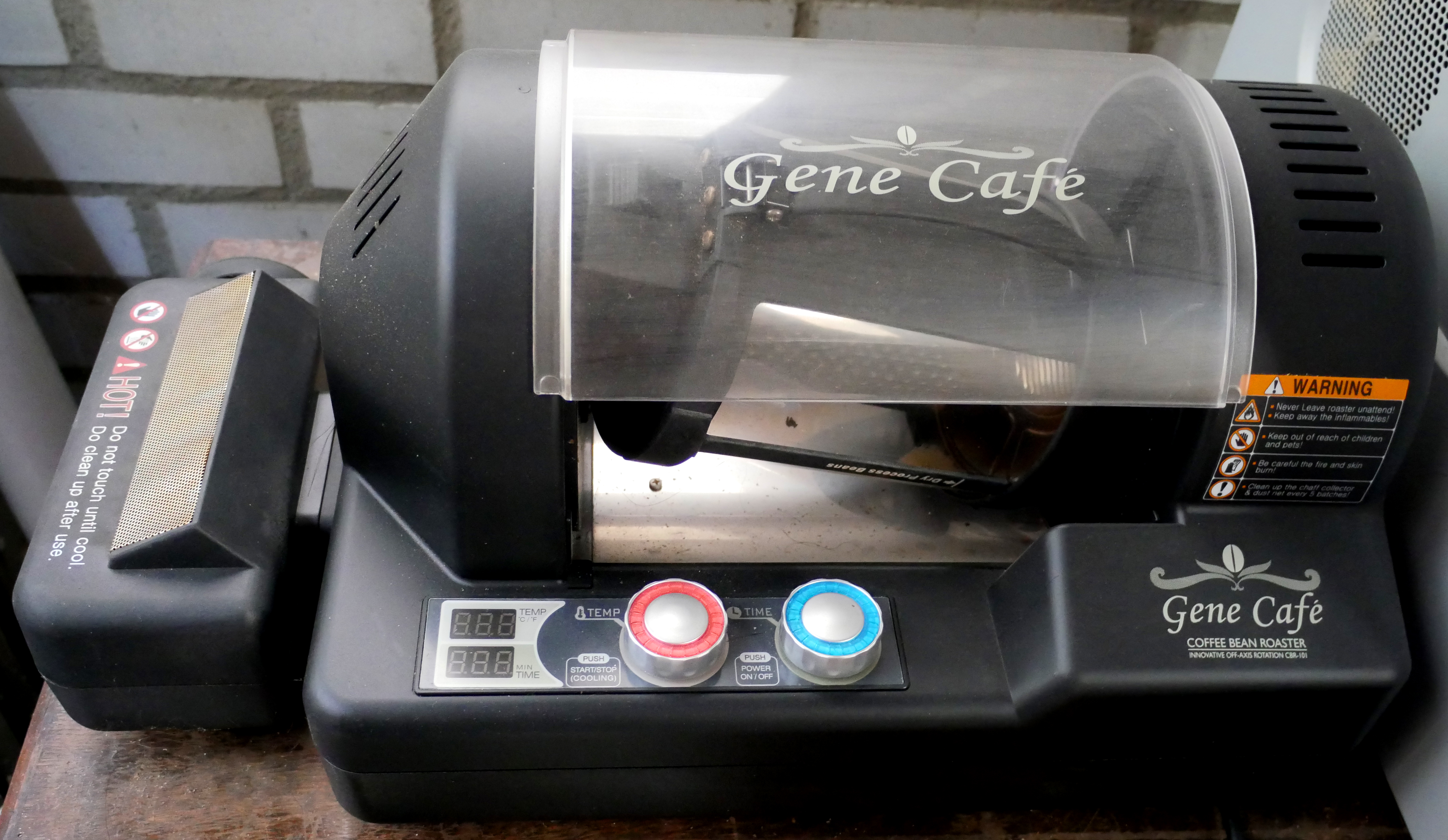 Thuisbrandapparaat van het merk Gene